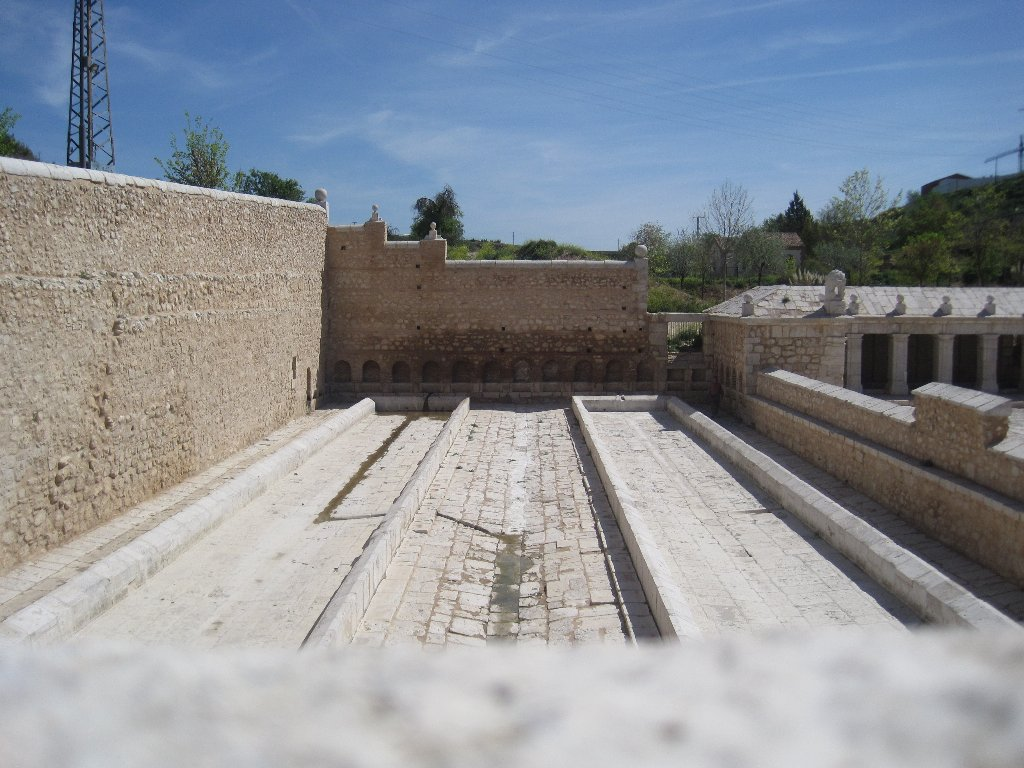 Lavaderos de la Fuente Grande de Ocaña (Toledo).